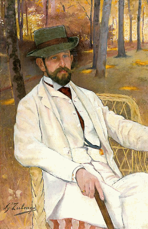 Ігнасіо Сулоага, портрет маркіза Вільямарчел, 1893 р.